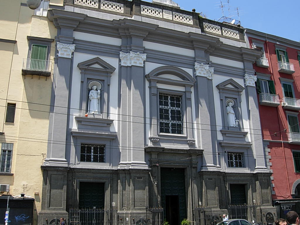 Chiesa di San Domenico Soriano in Napoli Foto personale concessa in PD